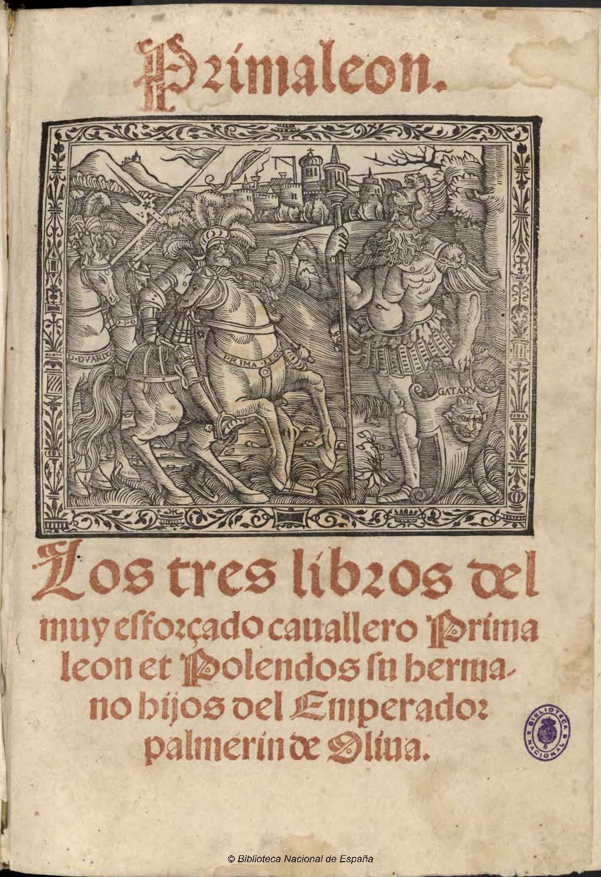 Primaleón Título: Primaleon los tres libros del muy esforçado cauallero Primaleon et Polendos su hermano hijos del Emperador palmerin de Oliua Autores: Nicolini da Sabbio, Giovanni Antonio. Pederzano, Giovanni Battista Fecha: 1534 Datos de edición: En la inclita ciudad del Senado Veneciano impreso por M. Iuan Antonio de Nicolini de Sabio alas espesas de M. Zuan Batista Pedregan ...